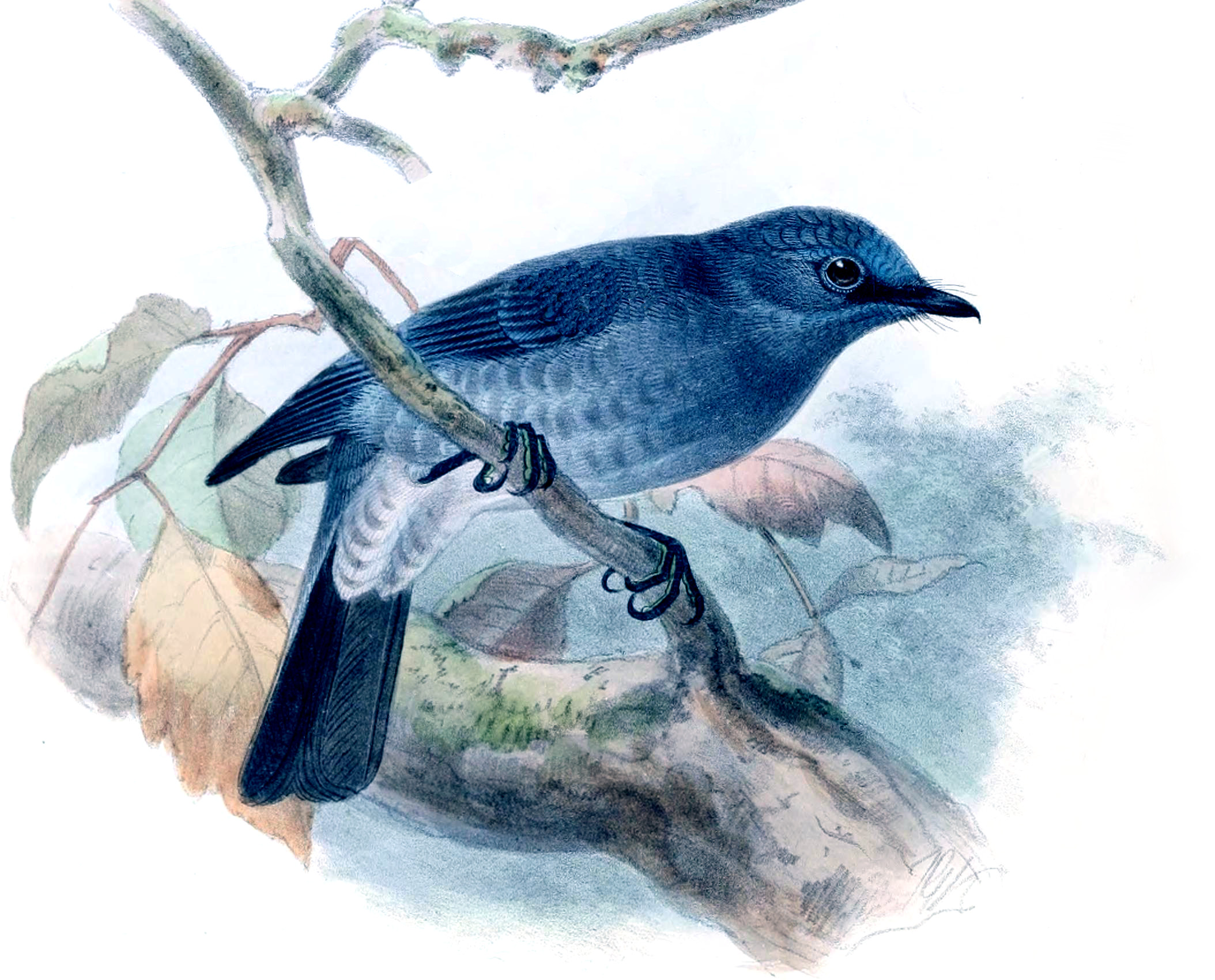 Stoparola sordida = Eumyias sordidus